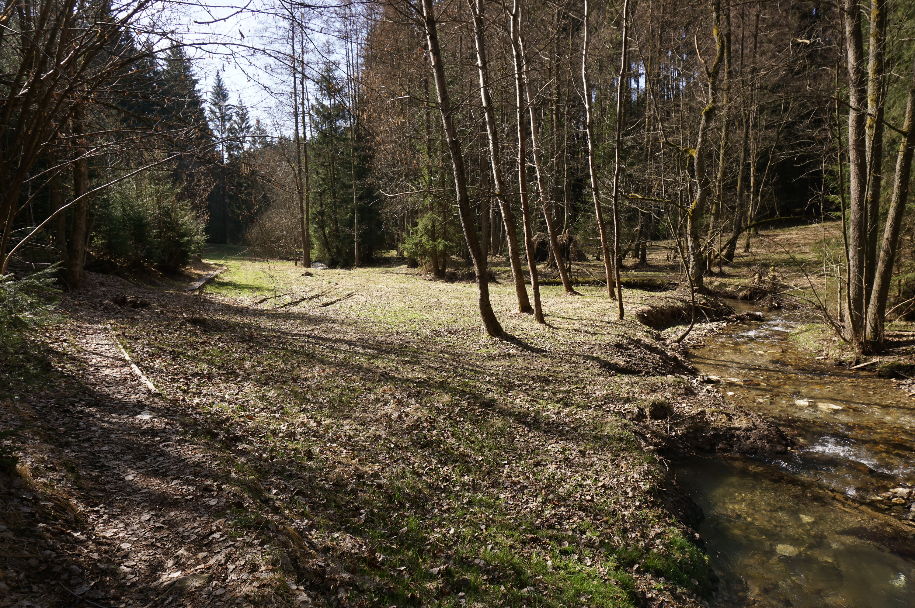 PR Údolí Vošmendy (jaro 2019)